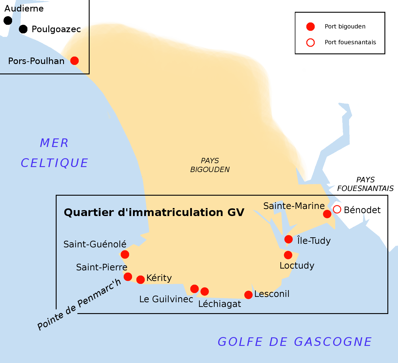 Pors-Poulhan est compris dans le quartier d'immatriculation AD, et son activité est tournée vers Audierne, du fait de la proximité. Les autres ports bigoudens forment, avec le port fouesnantais de Bénodet, le quartier d'immatriculation GV.